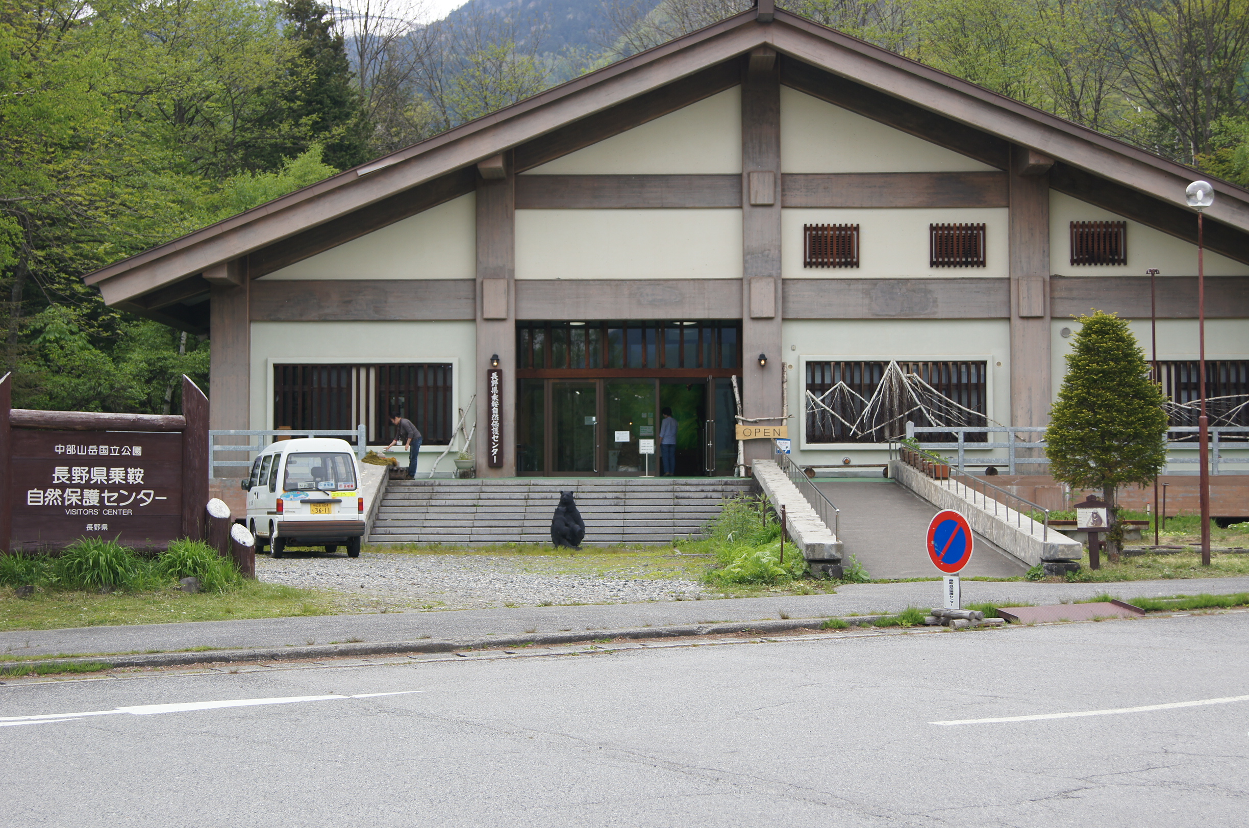 長野県松本市安曇の乗鞍高原にある長野県乗鞍自然保護センター建物前面